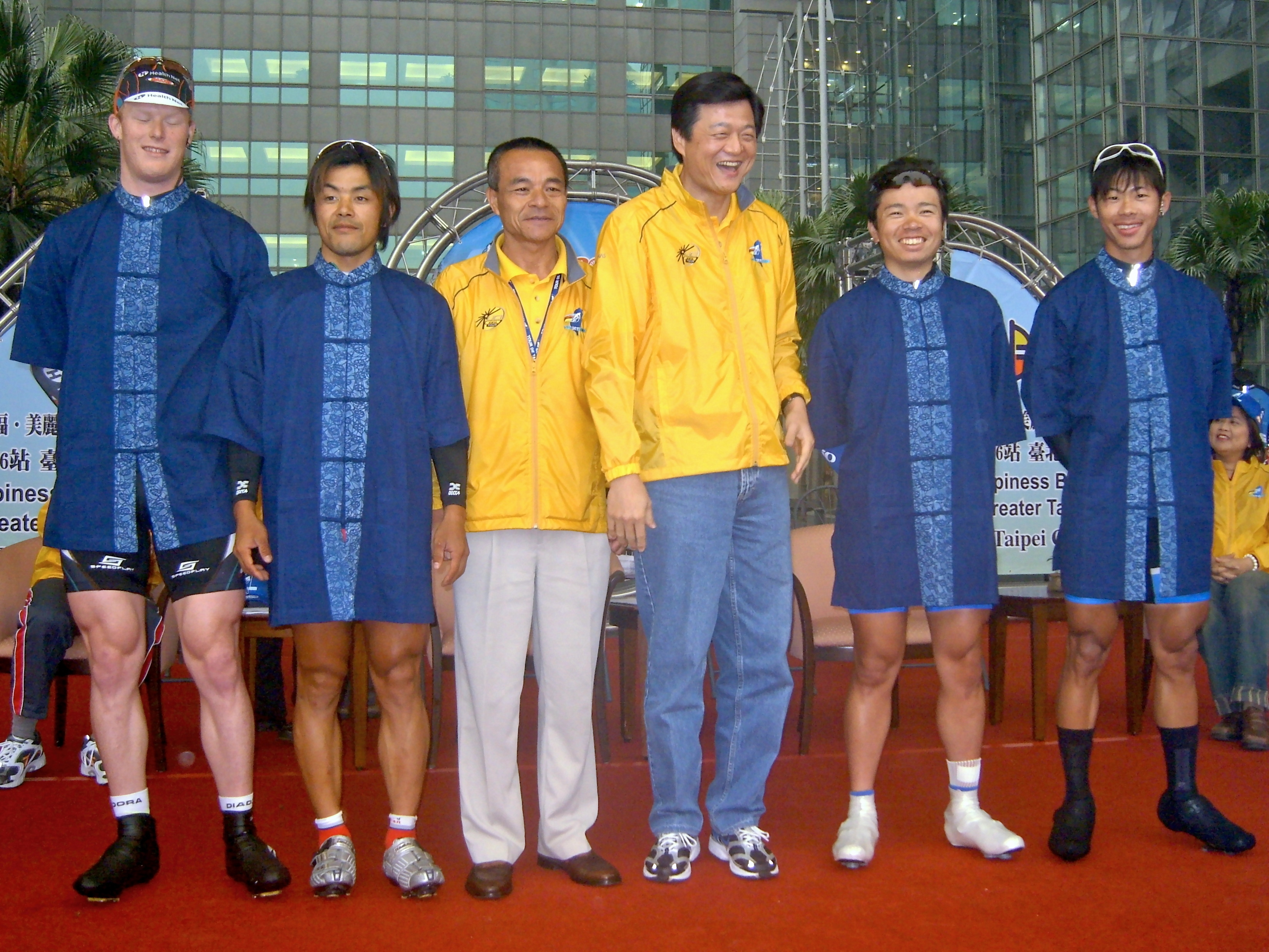 2008 Tour de Taiwan Taipei County Stage: Former Stage Winners.